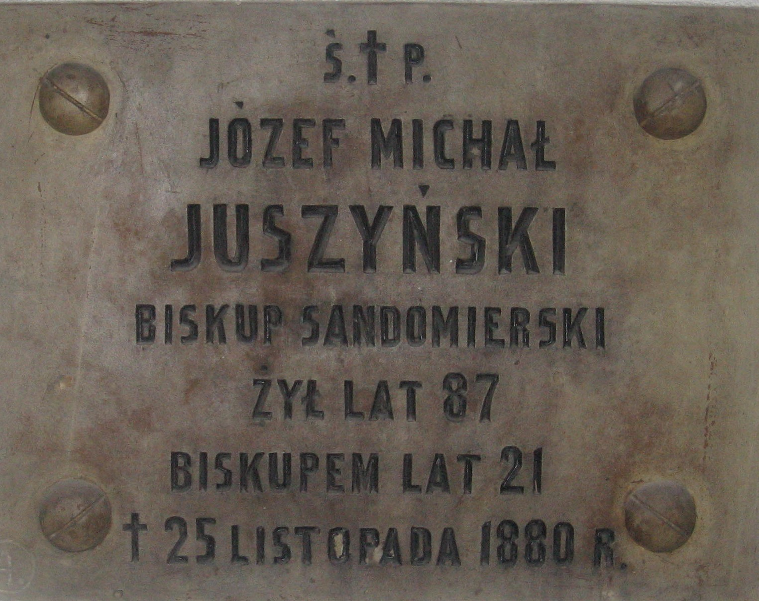 Płyta nagrobna bpa. Juszyńskiego w krypcie katedry sandomeirskiej